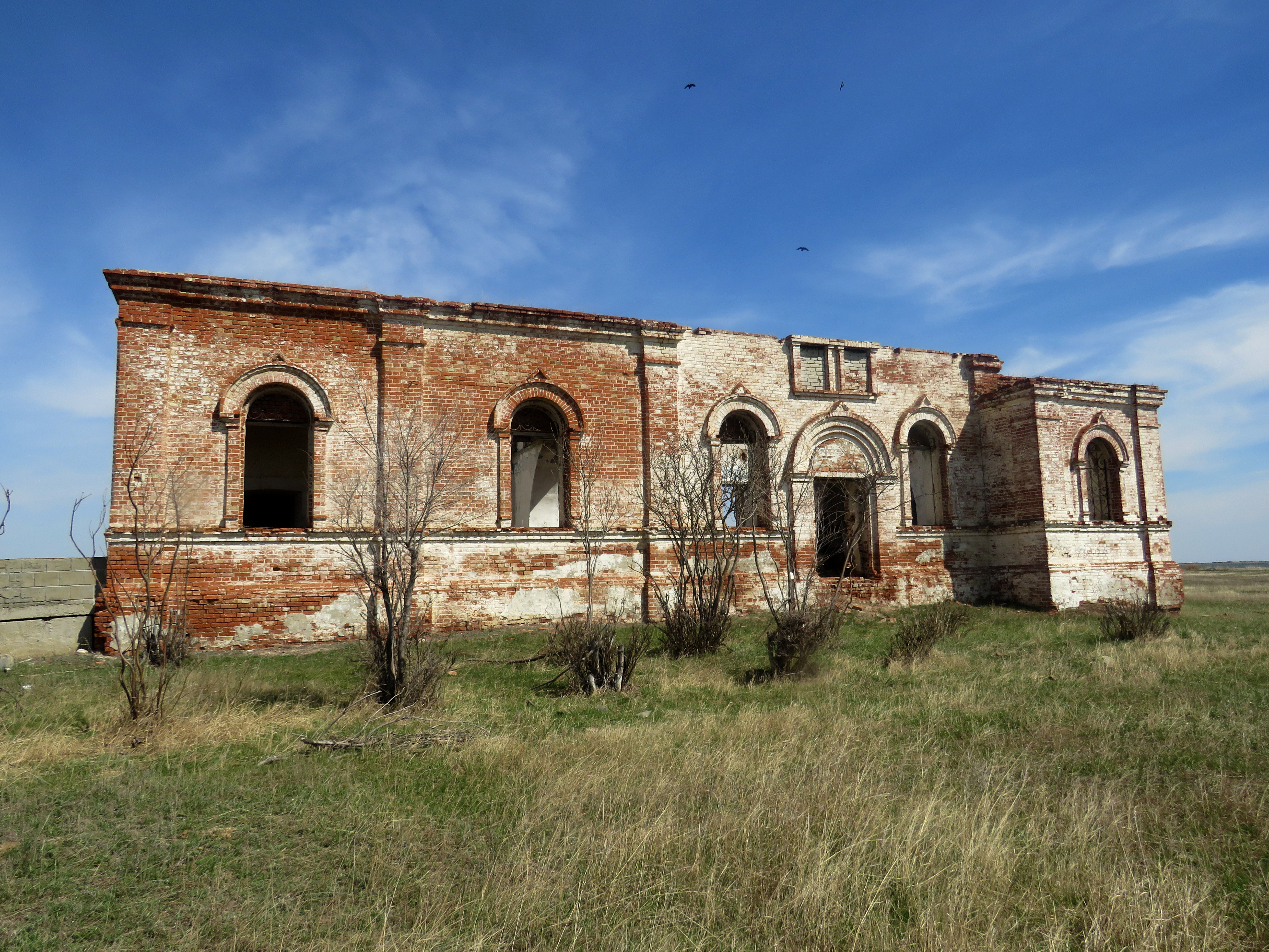 Полуразрушенная церковь в Анновке